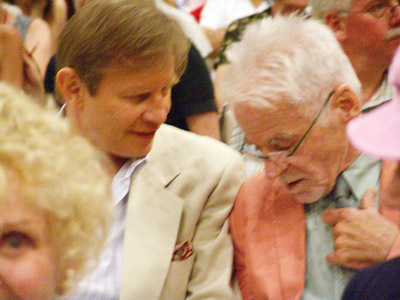 Michael York und Don Bachardy, Eröffnung Isherwood Foundation, Huntington Library, Huntington Beach/Kalifornien